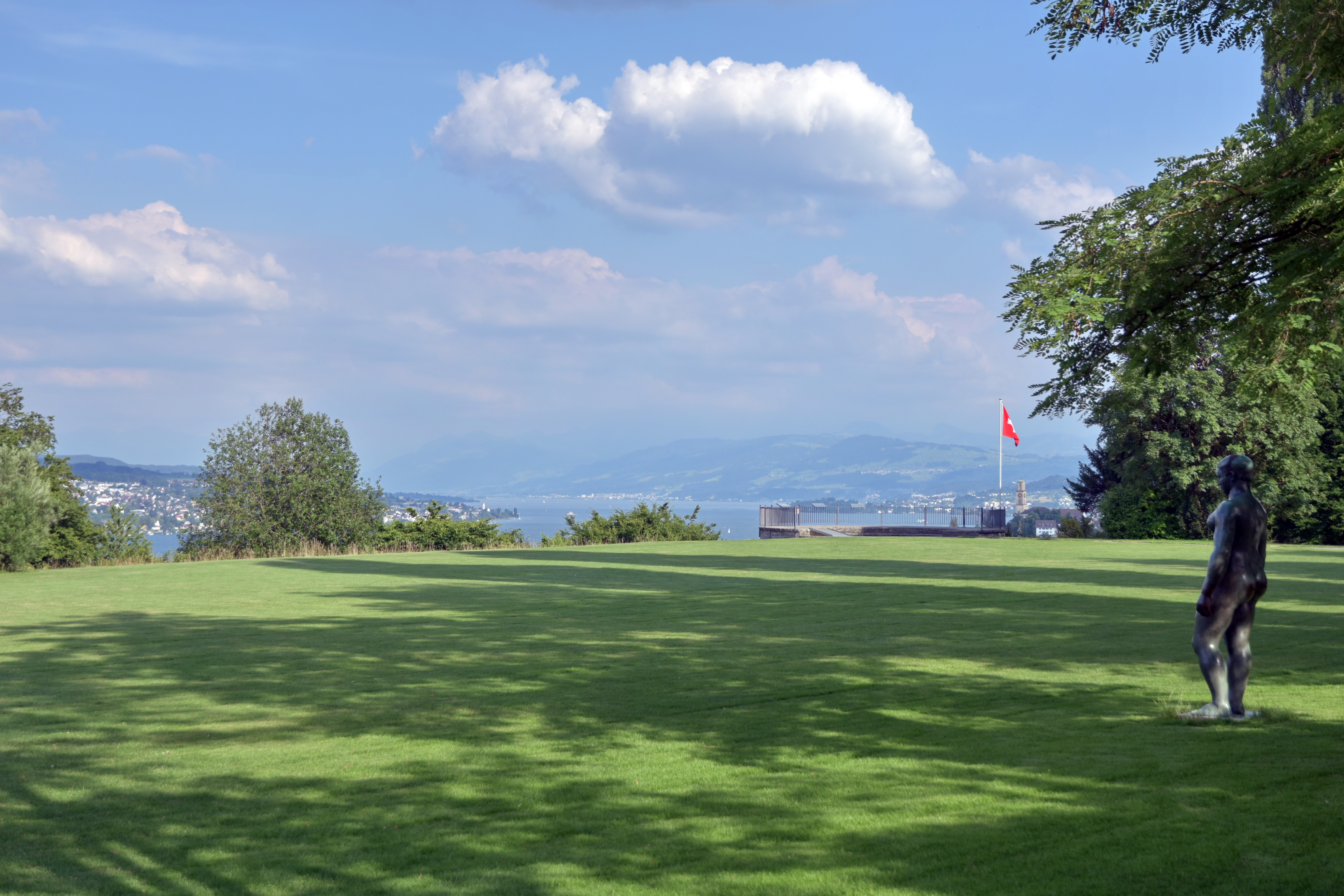 Adele & Gottlieb Duttweiler's' Park im Grüene in Rüschlikon (Switzerland)